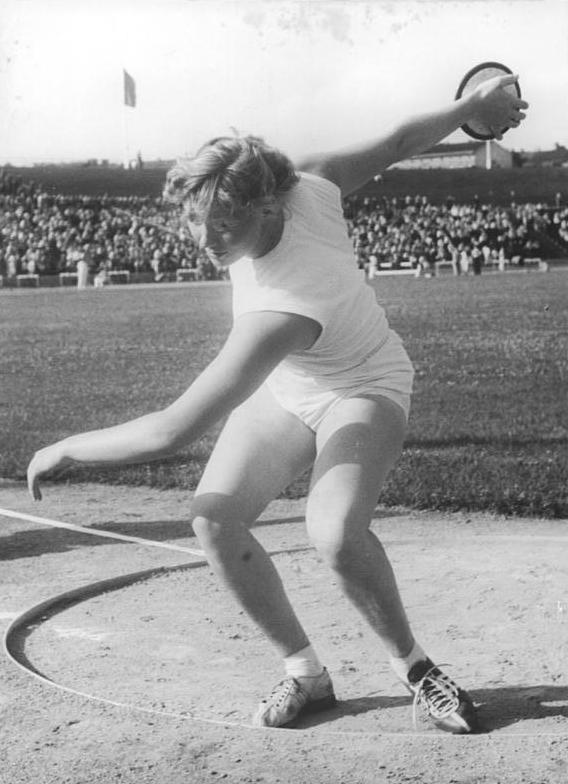 Doris Müller Zentralbild Wendorf 13.07.1957 2.Tag der Deutschen Leichtathletik-Meisterschaften 1957. UBz: Beim Diskuswerfen der Frauen siegte Doris Müller (SC Wissenschaft DHfK)